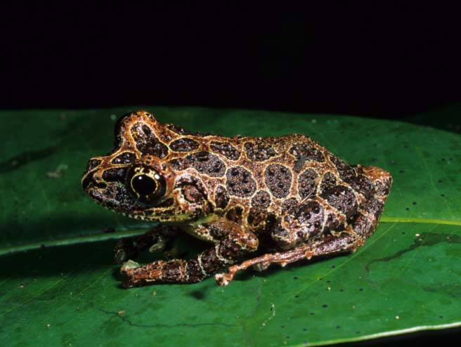 Spinomantis peraccae